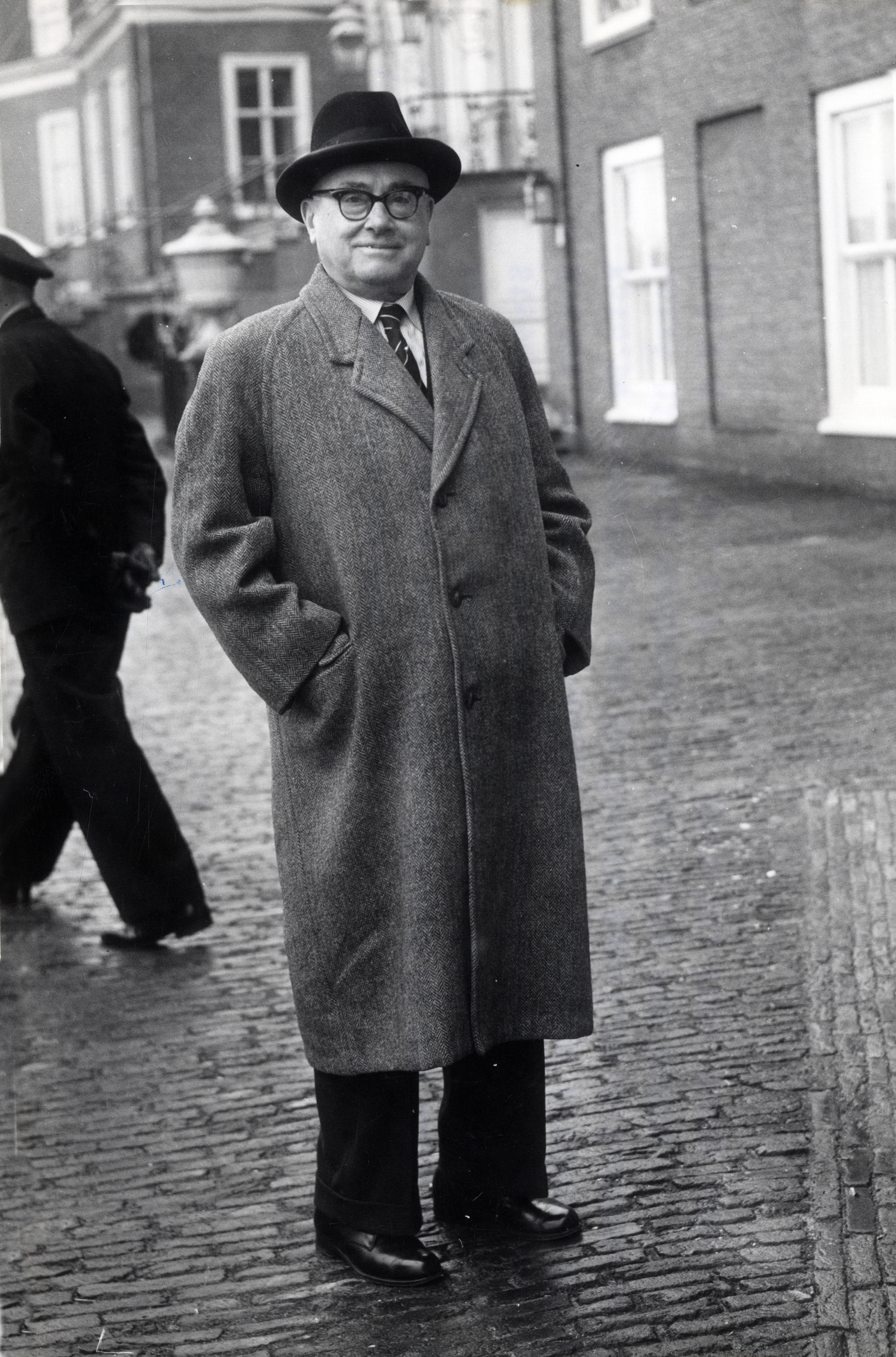 Kamervoorzitter L.G. Kortenhorst bij Huis ten Bosch voor overleg over de kabinetscrisis. Nederland, 28 april 1959.